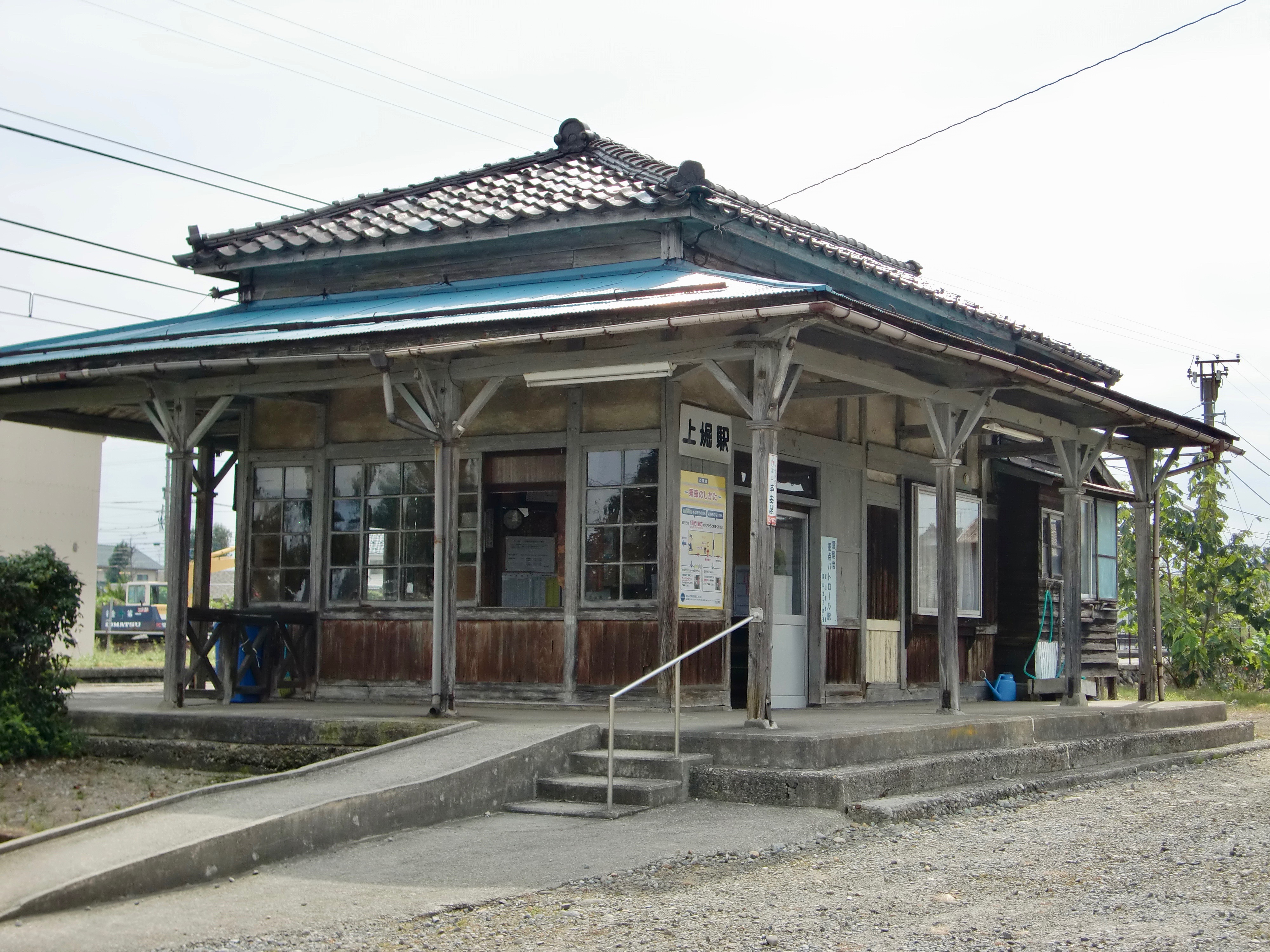 富山地方鉄道上滝線上堀駅